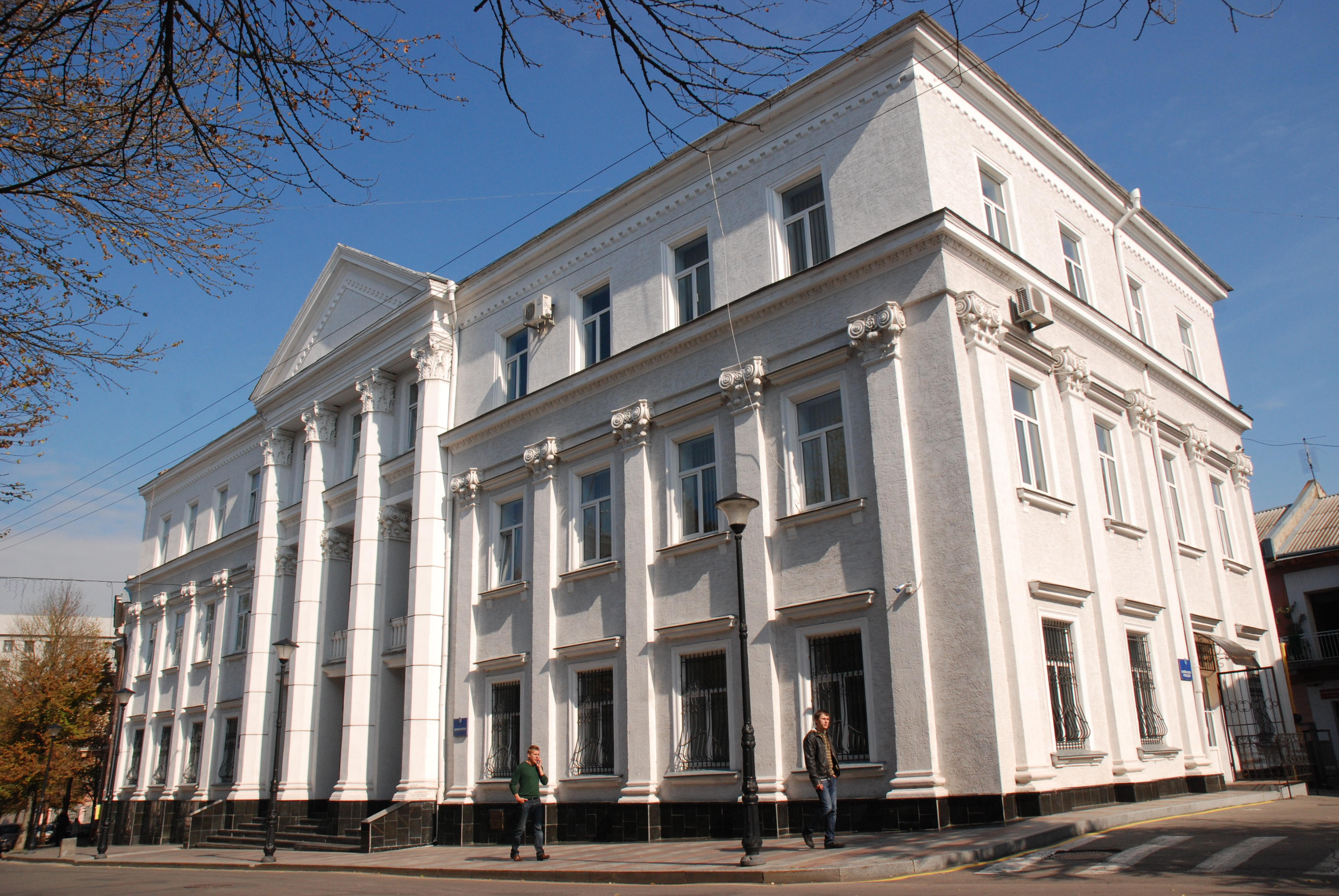 Колишній Жіночий ліцей (мур.) к.19 ст., зараз будинок Прокуратури Тернопільської області